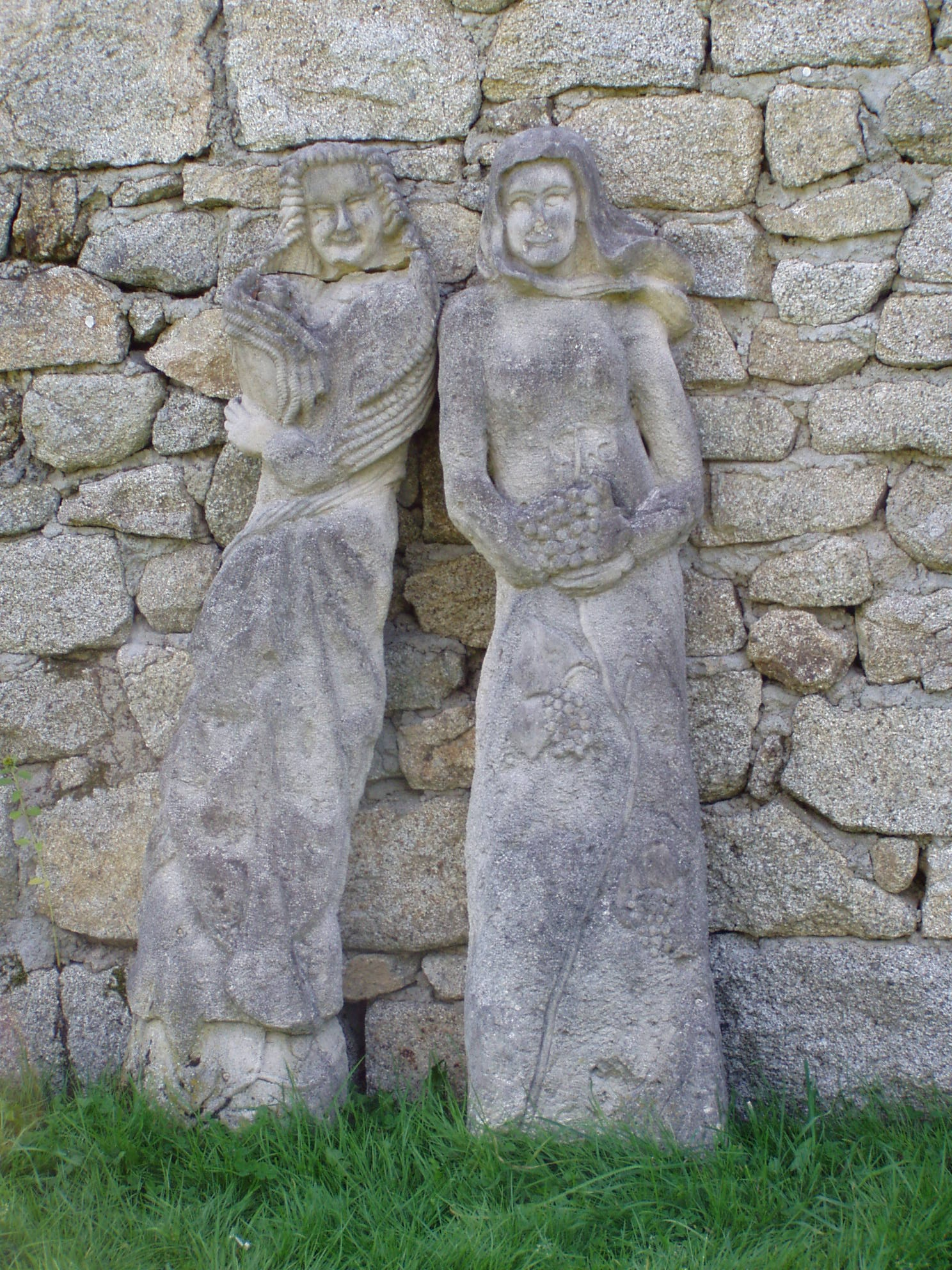 Sculptures à Masgot, hameau de Fransèches (Creuse, France)